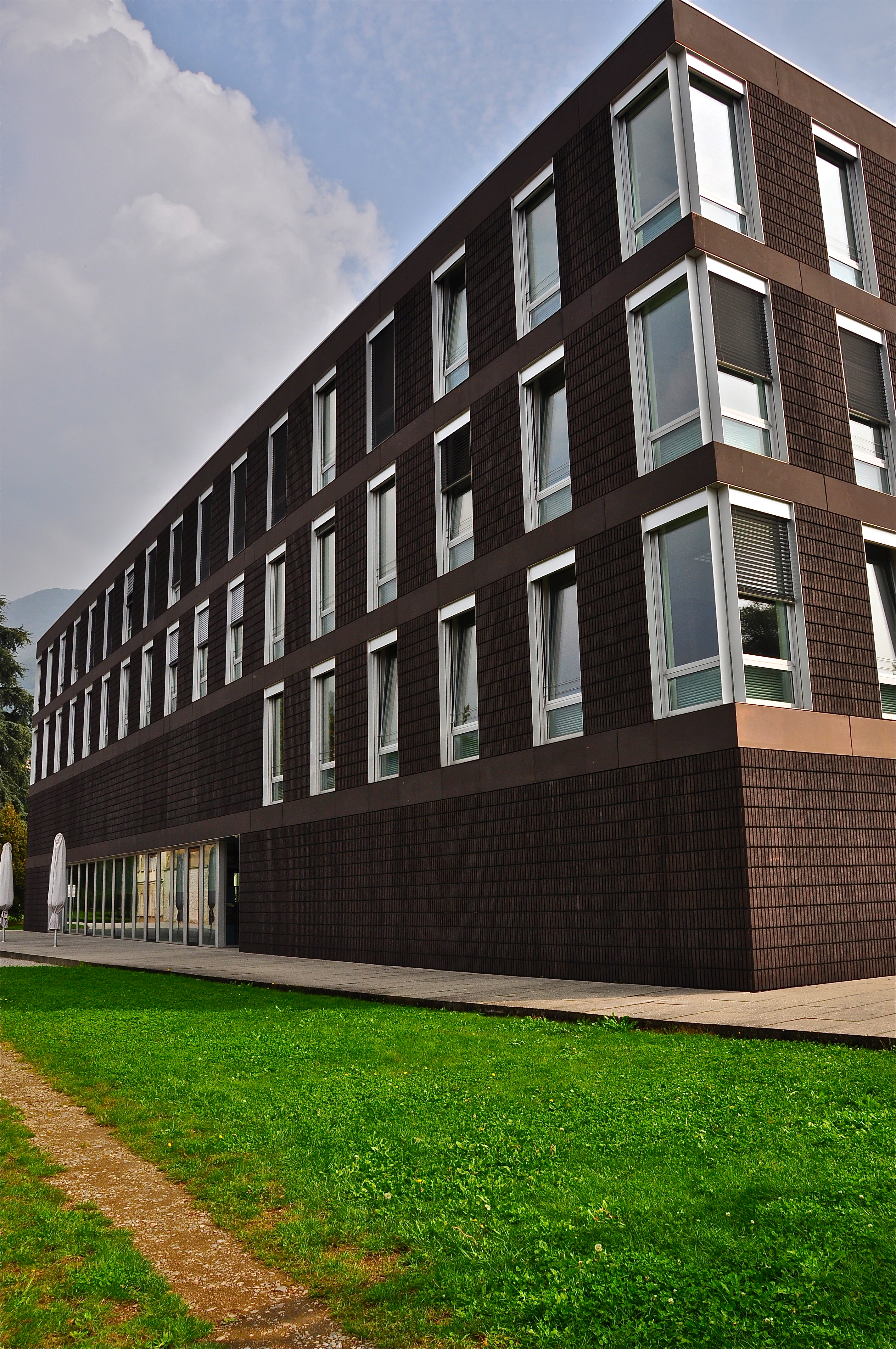 Facciata verso il parco.